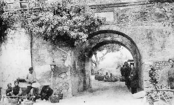 中文（台灣）: 鳳山新城北門。